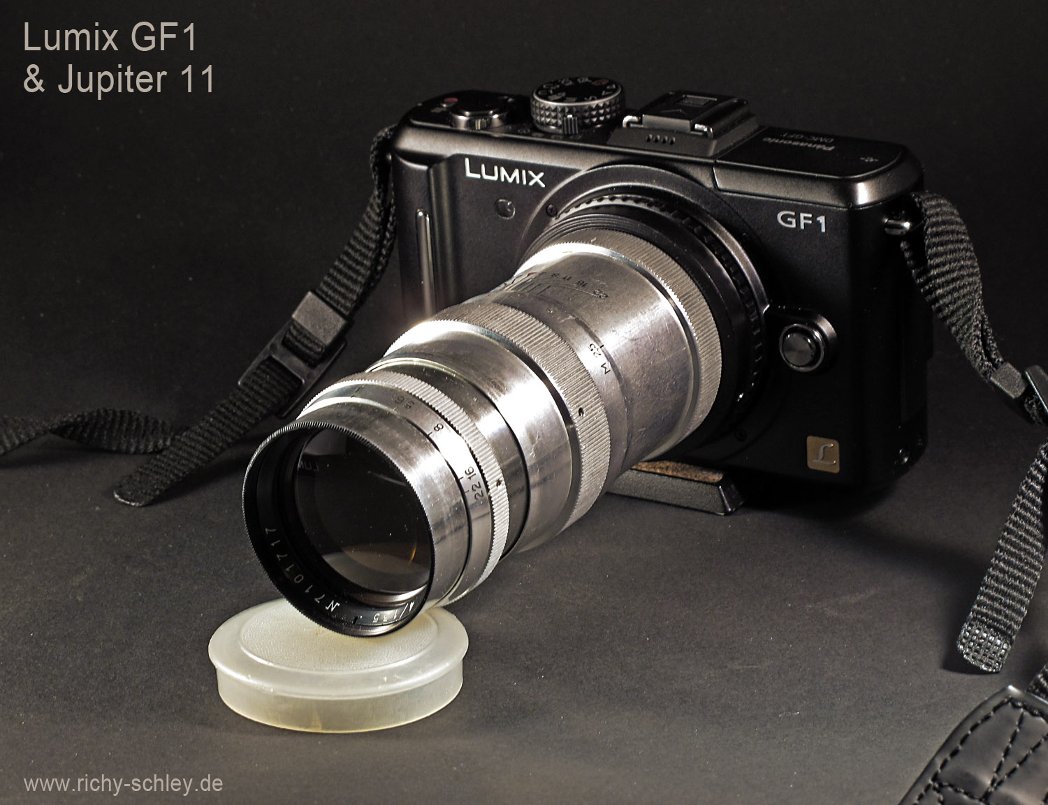 Die Micro Four Thirds Digitalkamera Lumix GF1 mit einem adaptierten russischen Objektiv Jupiter 11, 135 mm, 1:4